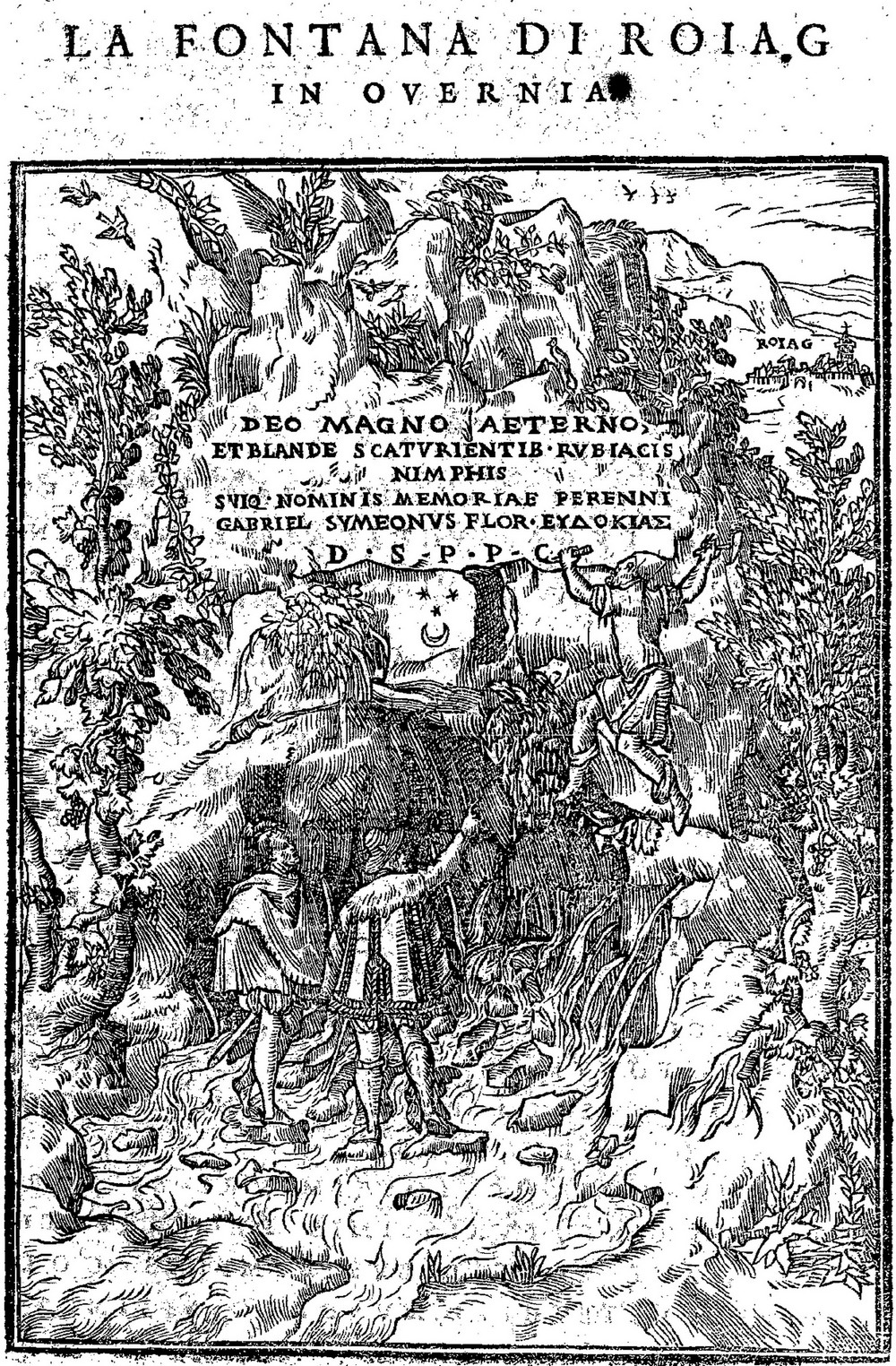 Fontaine de Royat en Auvergne, inscription reproduite dans La vita et metamorfoseo d'Ovidio, de Simeoni. Une inscription similaire se trouve au dessus de l'entrée de la petite grotte de Royat.